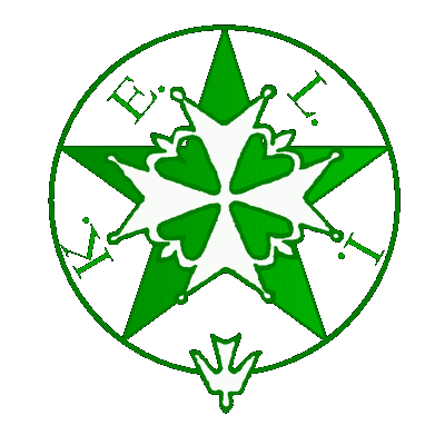 Emblemo de la Kristana Esperantista Ligo Internacia